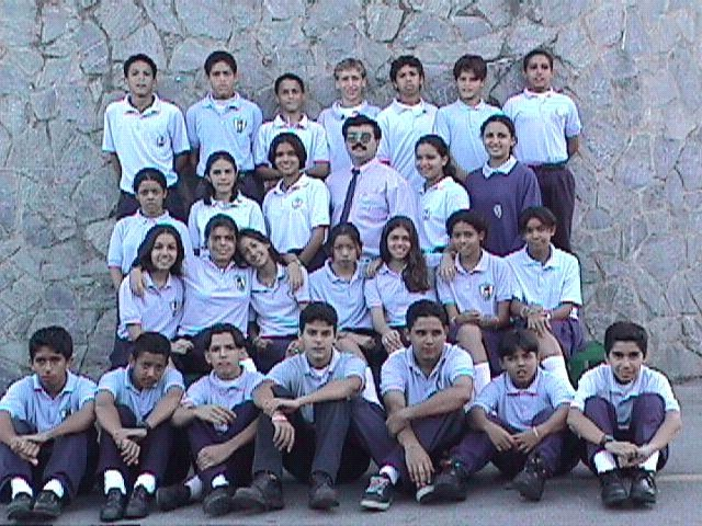 Fotos digitales del primer anuario digital